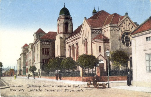 Ansichtskarte mit der Synagoge in Vítkovice (Ostrava)